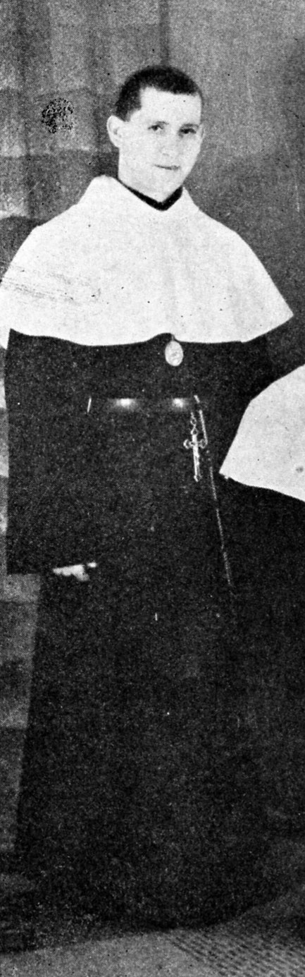 J. E. Krejčí v hábitu Těšitelů. Výřez z fotografie z publlikace "BARTOŠ, Antonín. Cyrilometodějská smírná kaple v Jerusalemě: Památník svěcení kaple se 122 obrazy.. [s.l.] : Palestinský spolek v Brně, 1936." Strana 94. Autor fotografie v publikaci neuveden.